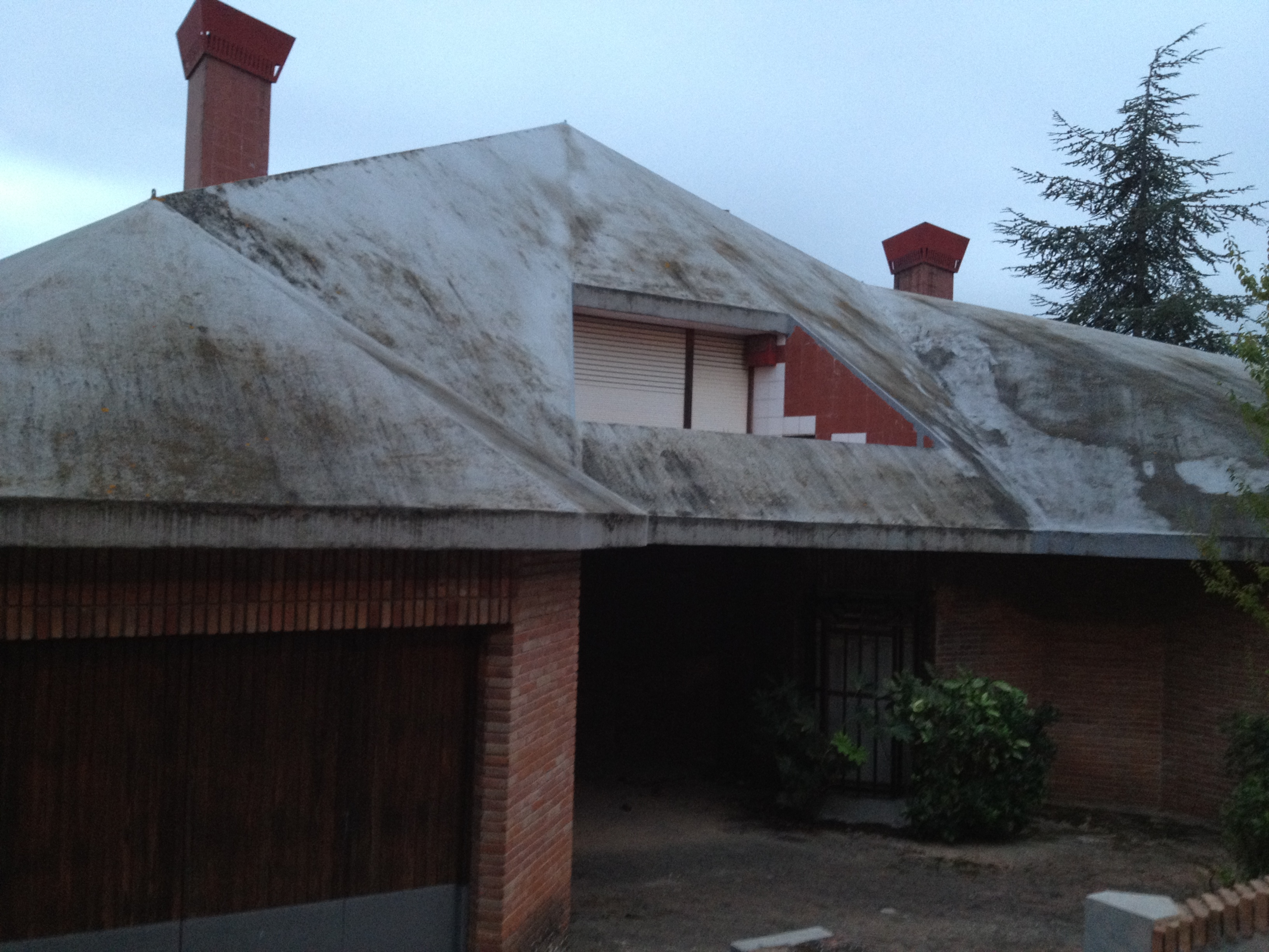 Casa unifamiliar al carrer Sant Sebastià, 26 (l'Ametlla del Vallès)